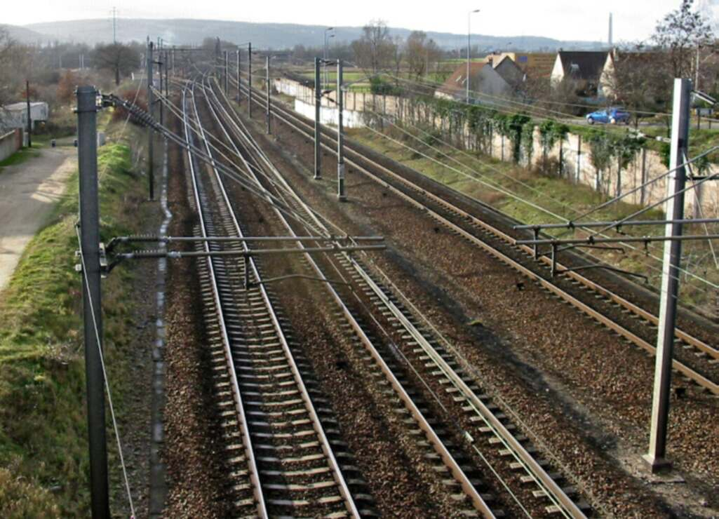 Voie ferrée à Épône (Yvelines) Spedona